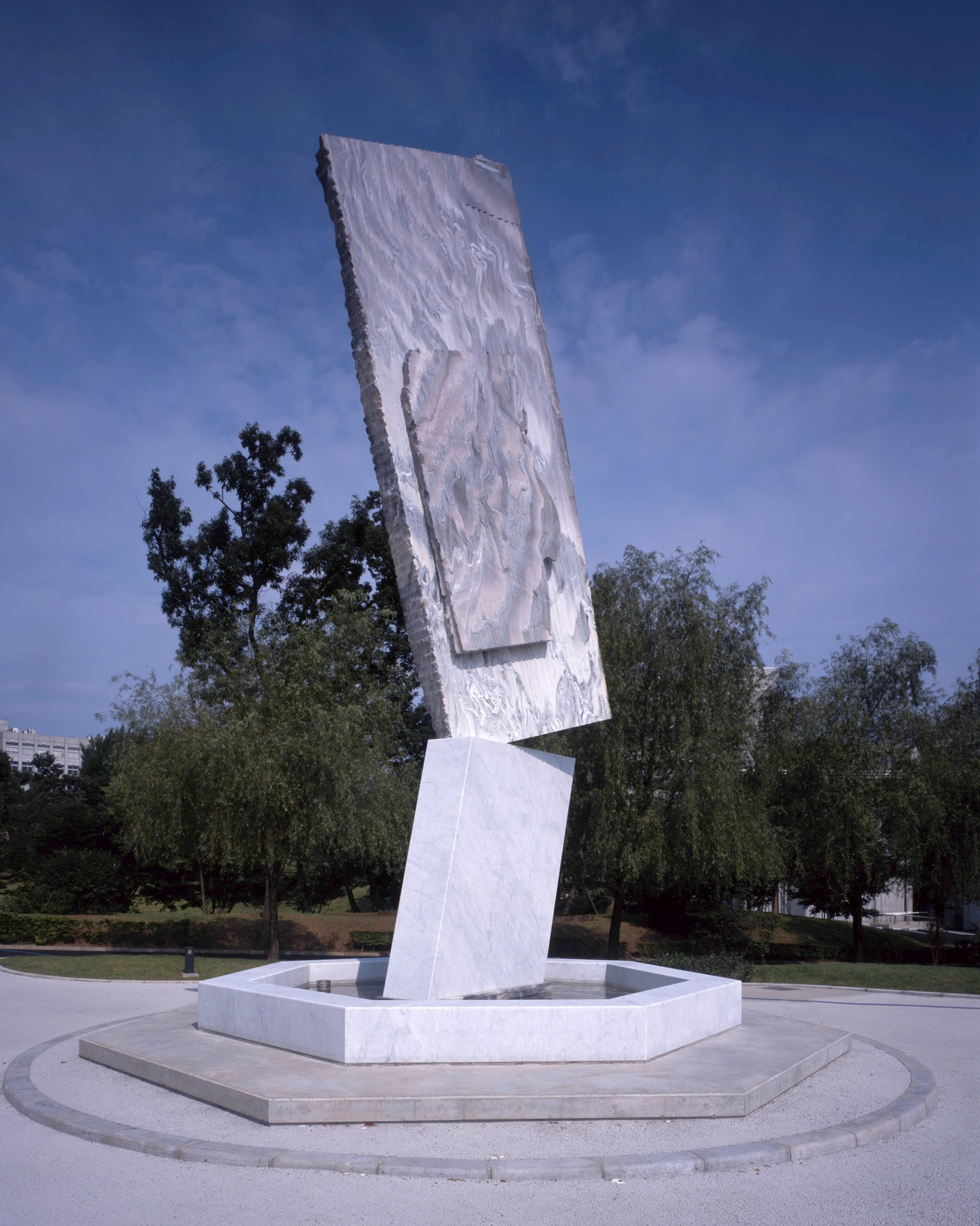 長澤英俊 作品 Tindari 2007